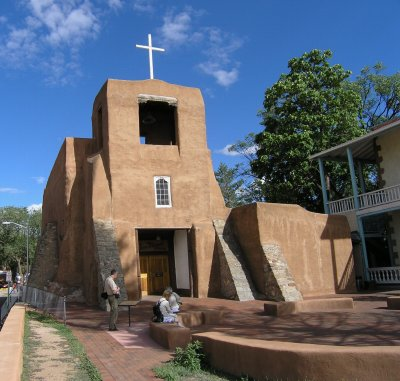 Kościół Sw Michała w Santa Fe 2004